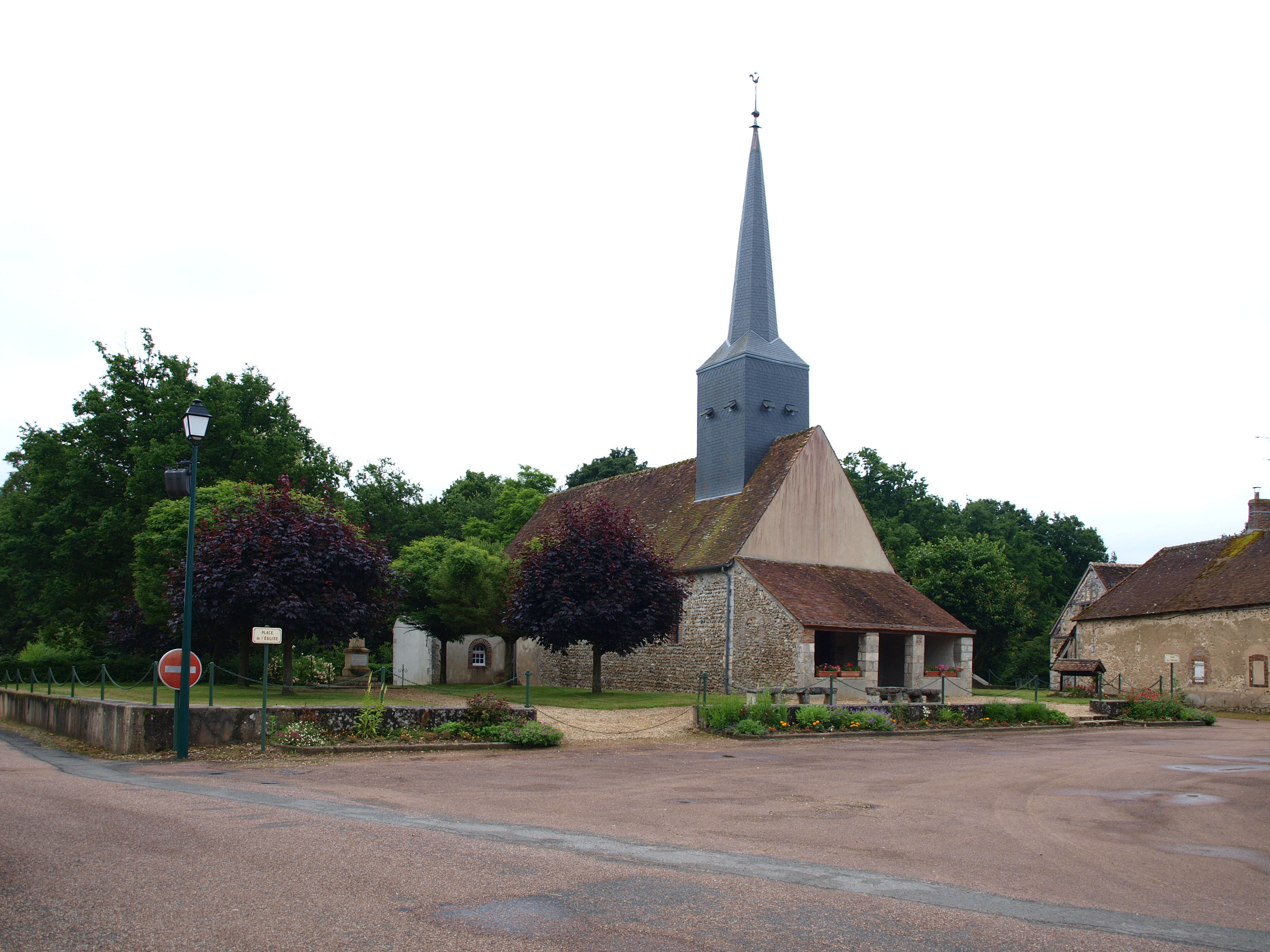 Louzouer (Loiret, France) ; l'église.